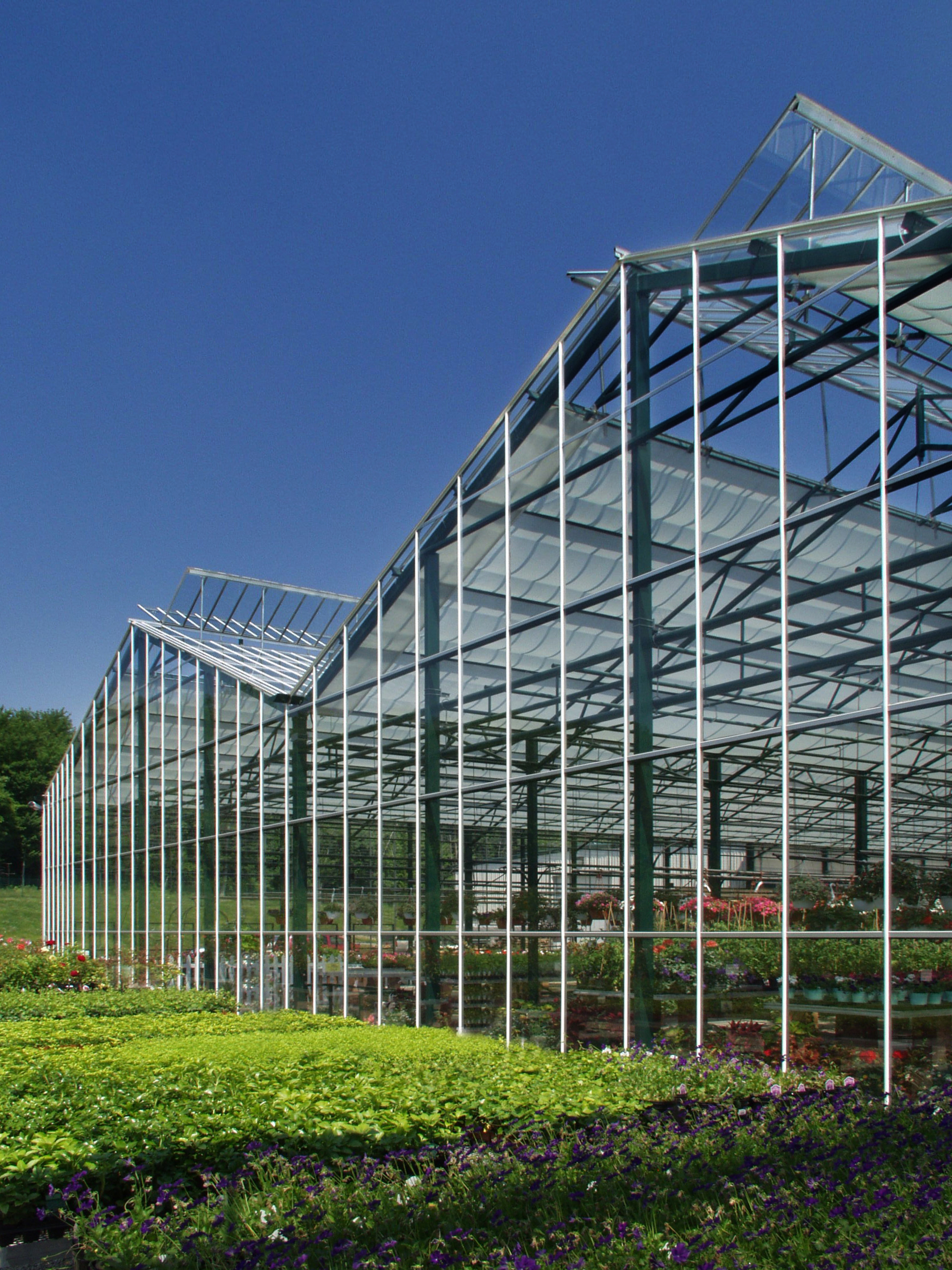 Eagle Creek Garden Center